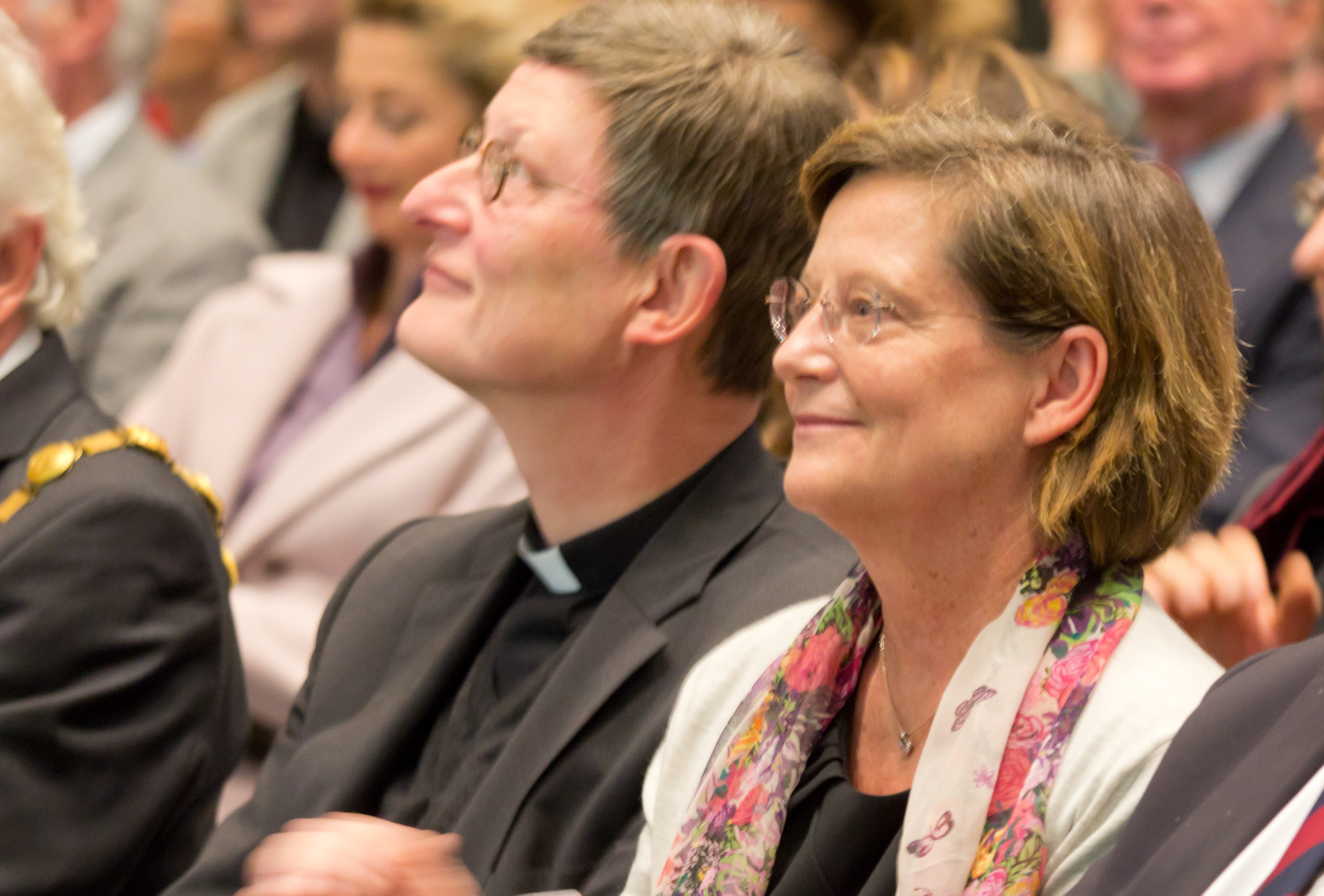 Ausstellungseröffnung Museum Schnütgen „Die Heiligen Drei Könige“ im Foyer des Kulturquartiers. Hier: rechts Elisabeth Taburet-Delahaye, Direktorin des Musée national du Moyen Âge, links Rainer Maria Woelki, Erzbischof von Köln.